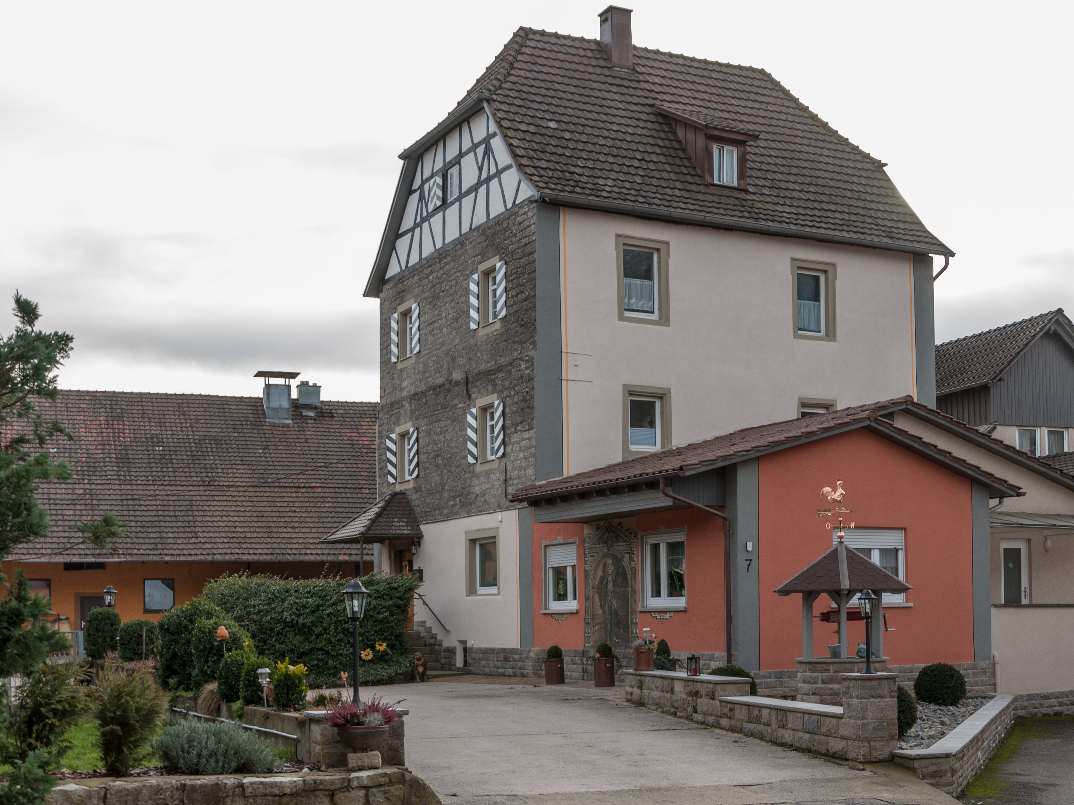 Burg Berlichingen in Baden-Württemberg